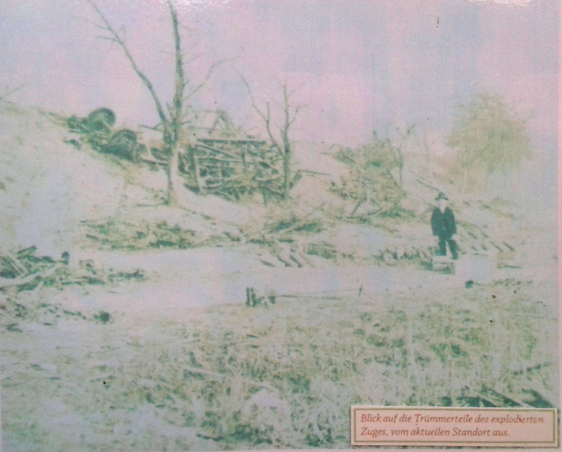 Der Unglücksort - entzerrt und Farben verbessert - created with Affinity Photo